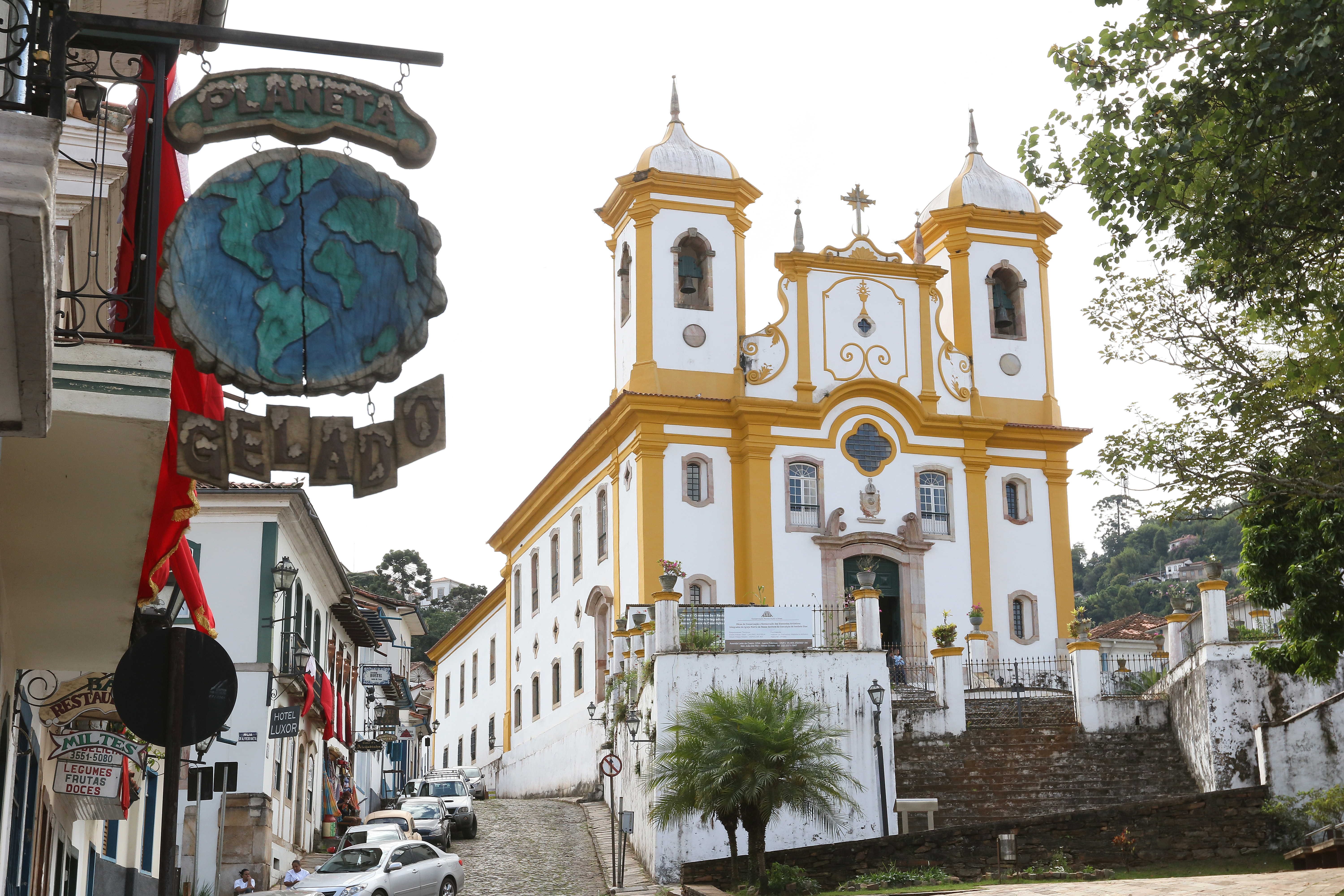 Visita a obra da Igreja Matriz de Nossa Senhora da Conceição de Antônio Dias - Ouro Preto - MG 13/04/2019 Fotos: Ronaldo Caldas/ASCOM/Ministério da Cidadania